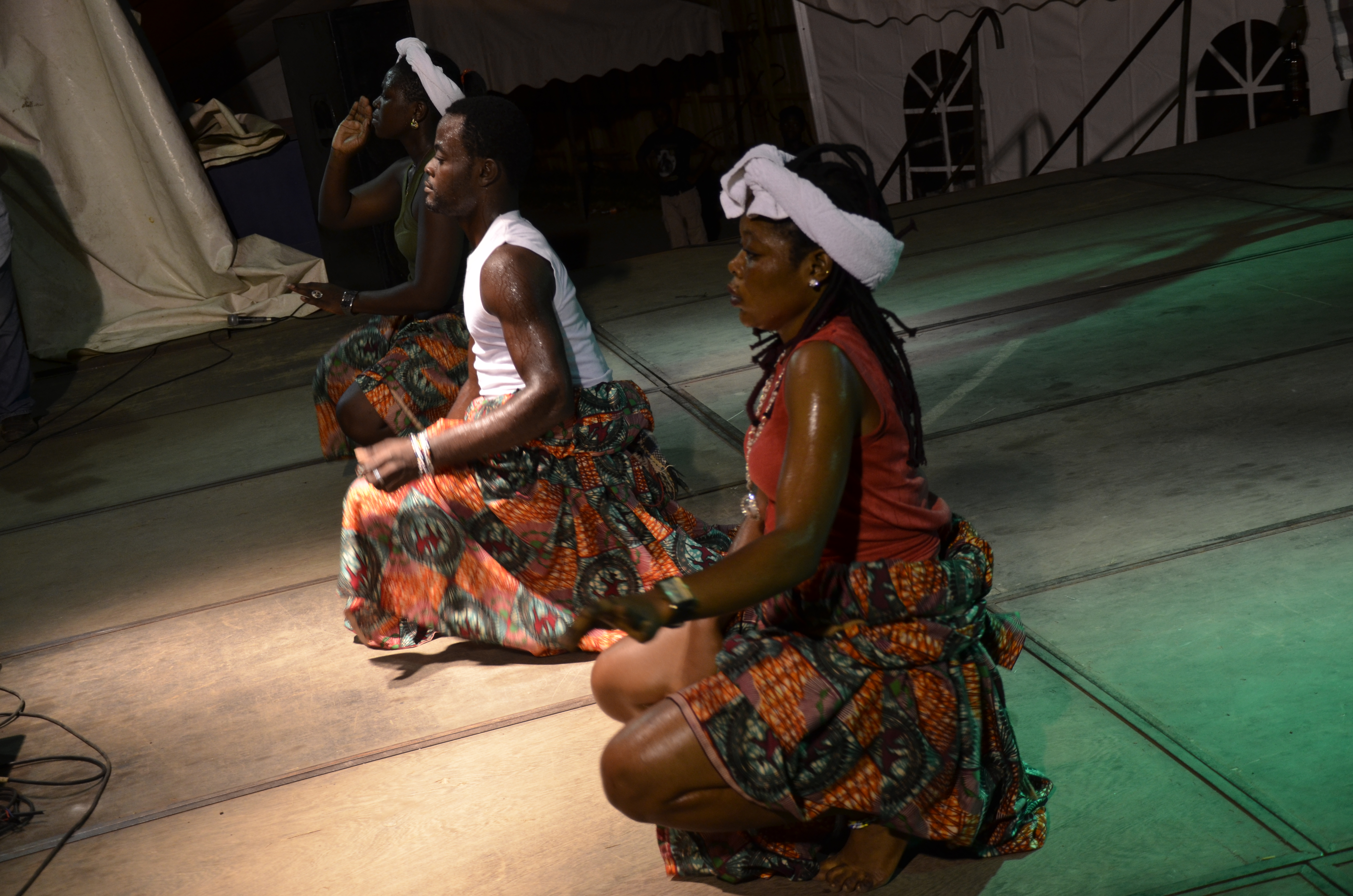 Danse traditionnelle assiko pendant le festival Mbog Liaa This is an image from Cameroon